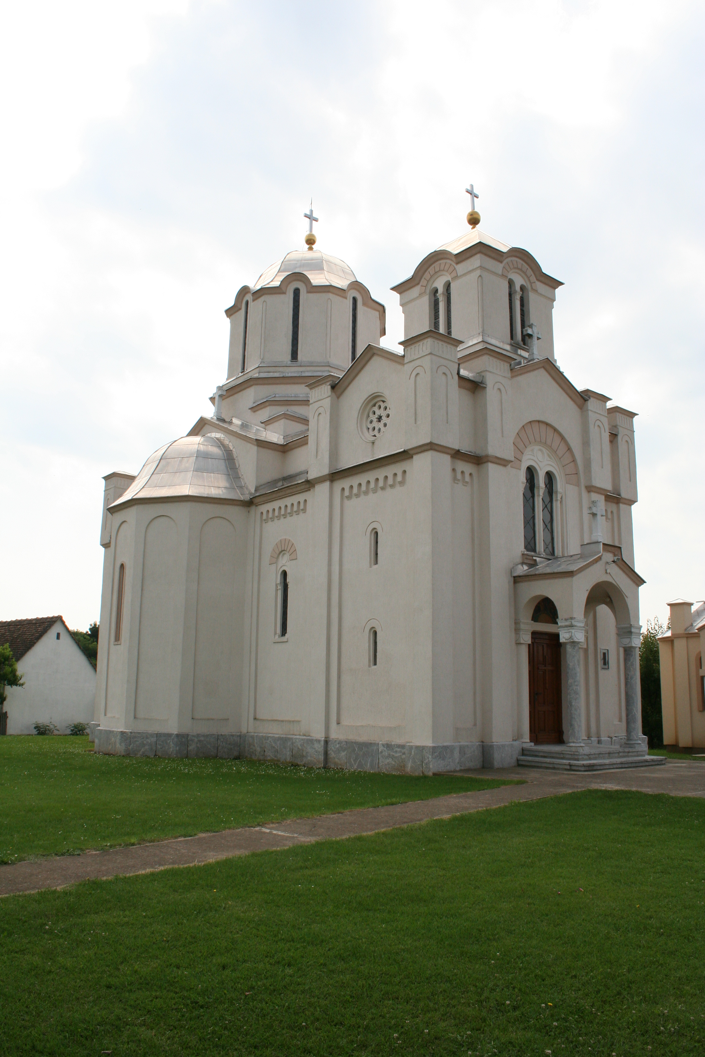 Crkva Svete Trojice u Zasavici II